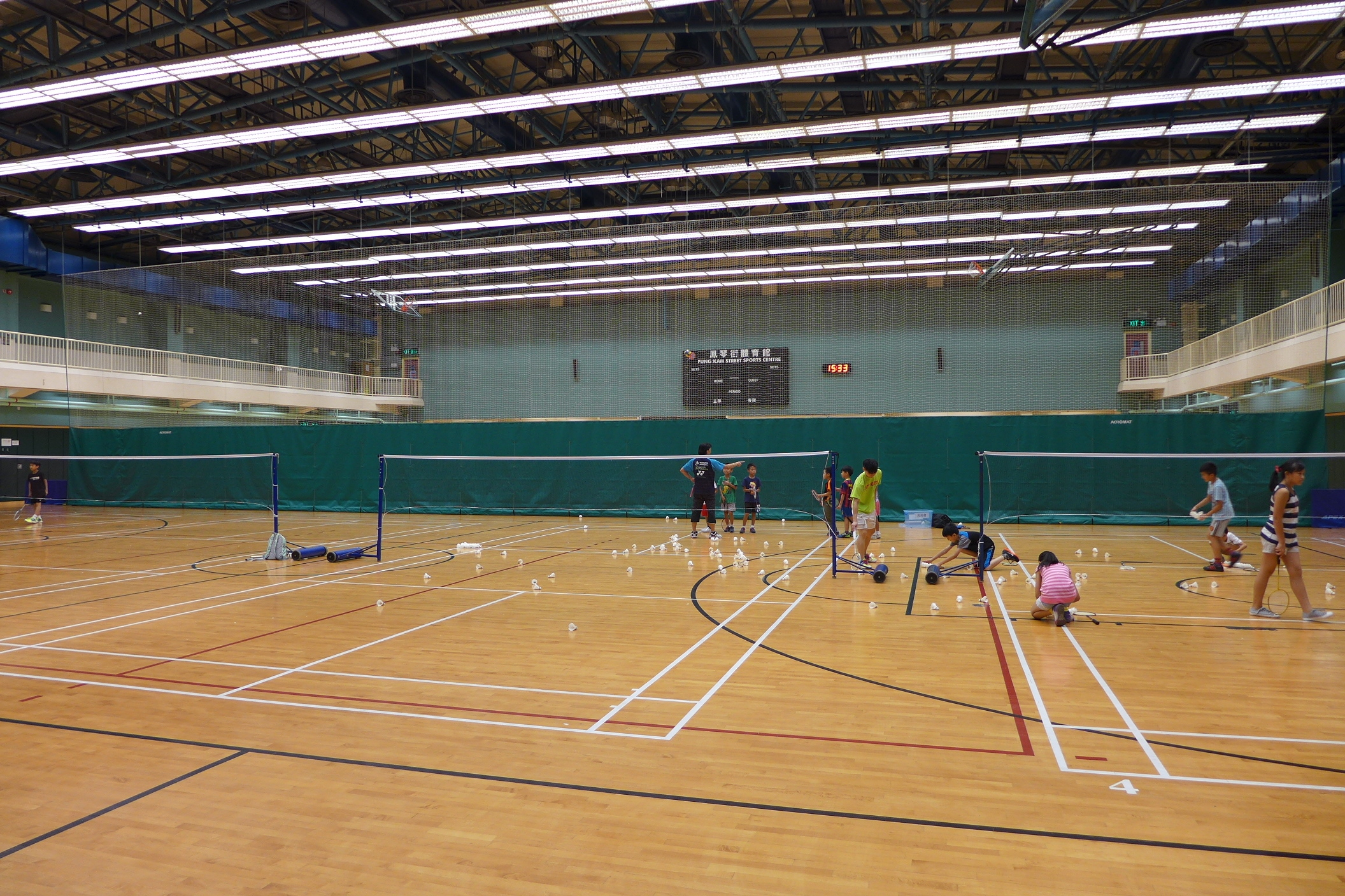 Fung Kam Street Sports Centre Interior